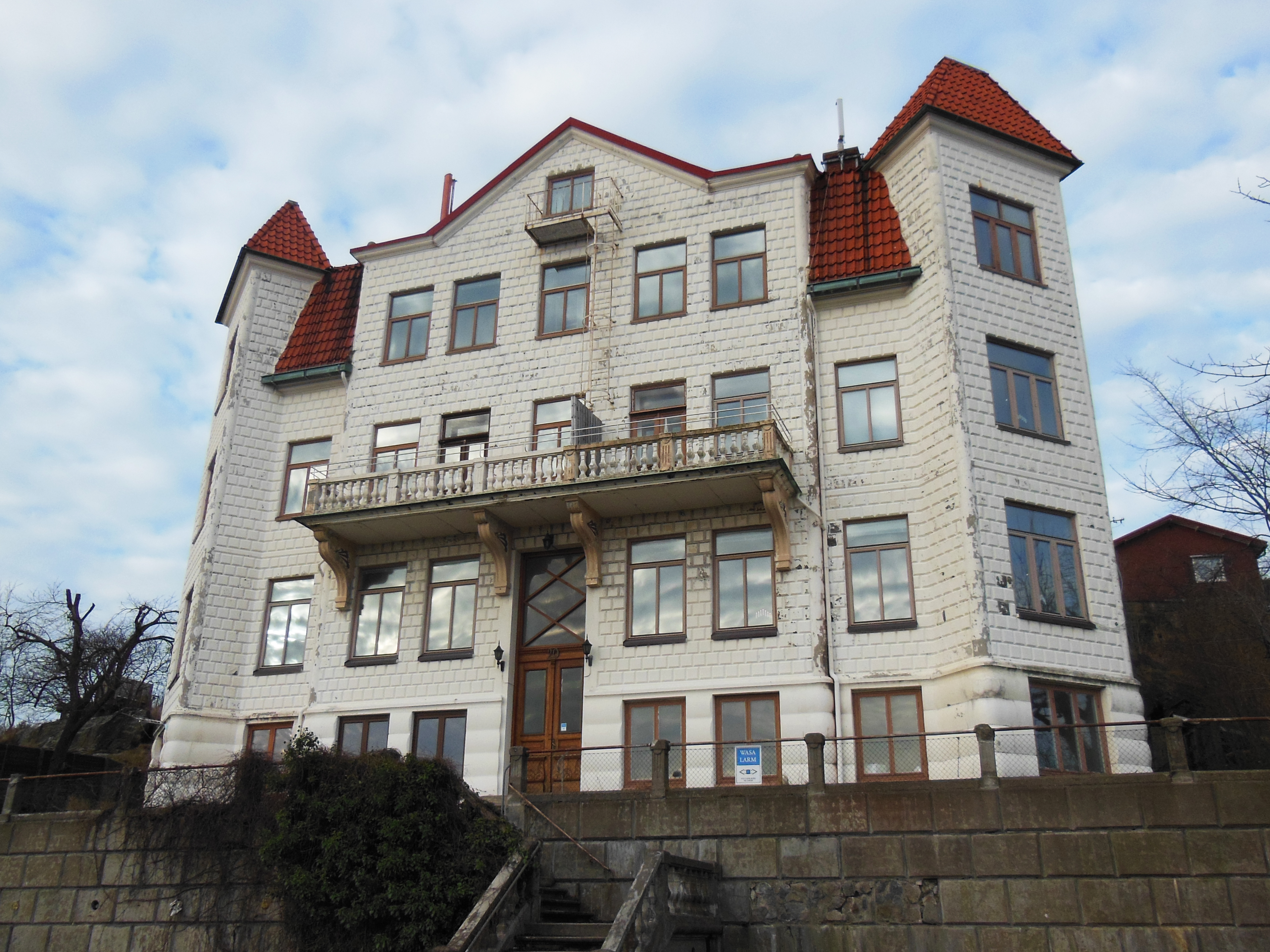 "Bagarens hus" på Palmsundsgatan 20 i Långedrag, Göteborg.